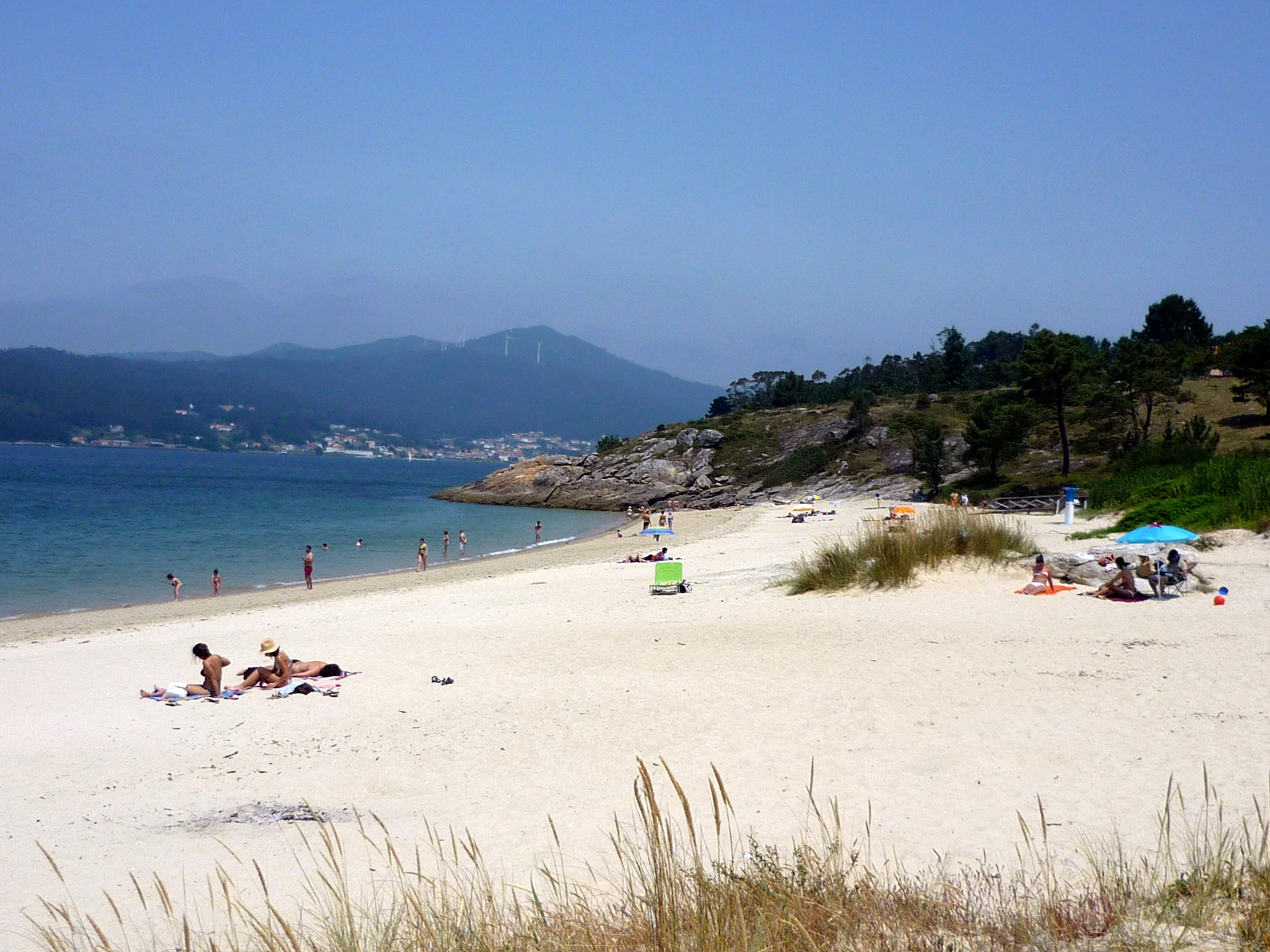 Praia de Ornanda en Porto do Son.